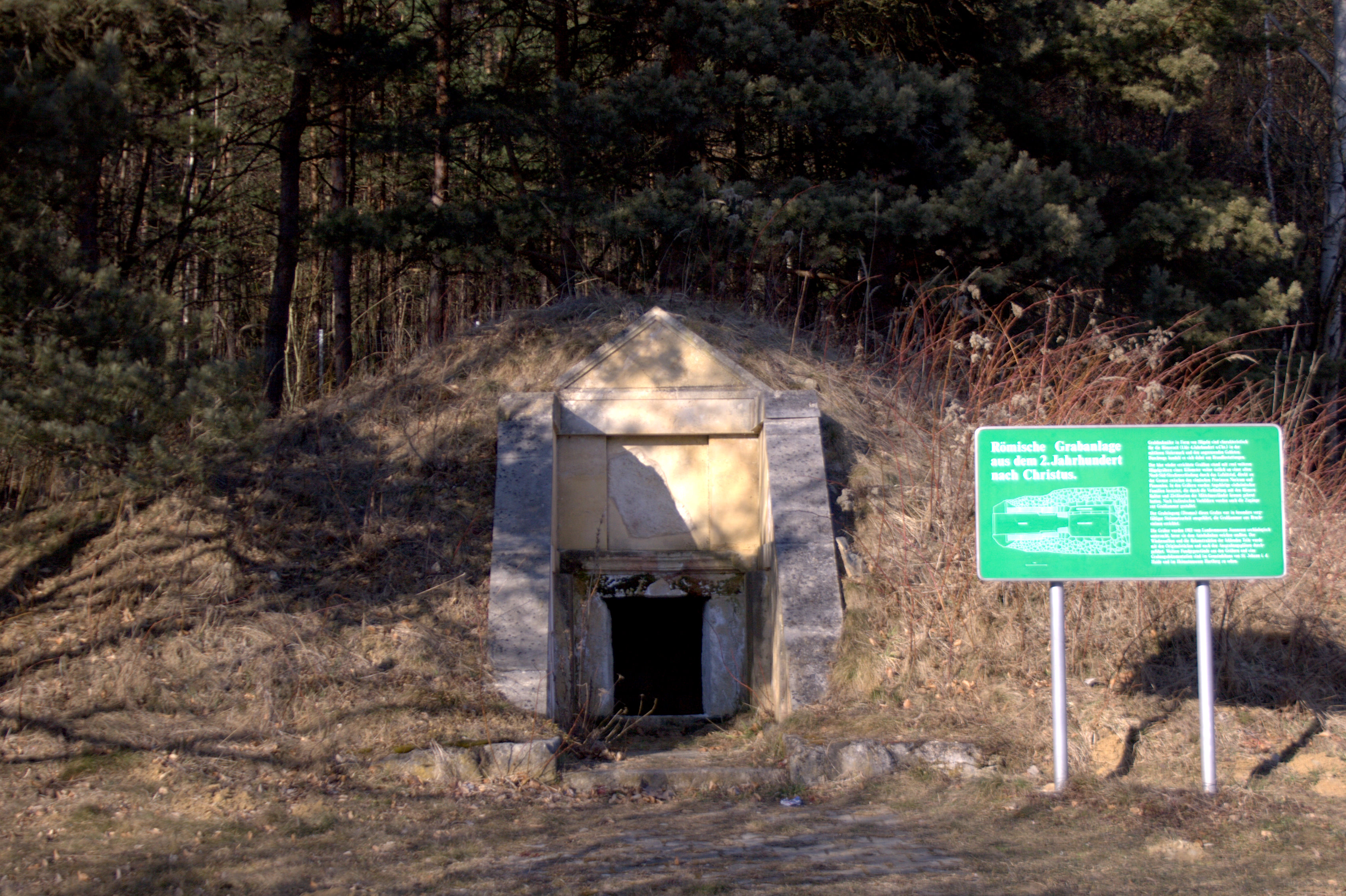 Sant Johann in der Haide Hügelgrab